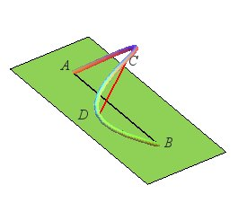 illustration théorème de la corde universelle en dimension 3